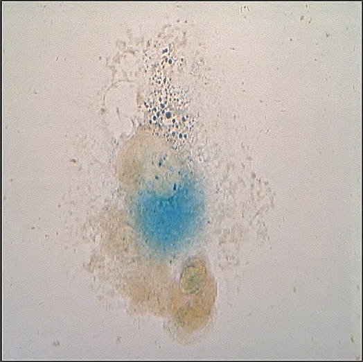 Φωτογραφία από οπτικό μικροσκόπιο σε μεγέθυνση 63 x. Το μπλε χρώμα αντιπροσωπεύει θετική χρώση για SA-β-gal με χρήση Xgal σε γηρασμένο κύτταρο.